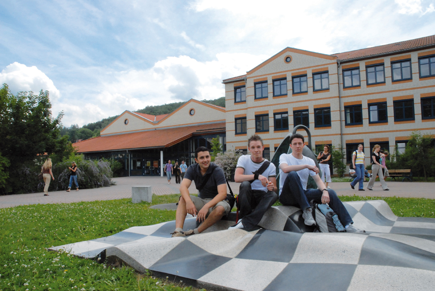 Fachbereich Wirtschaftswissenschaften (Haus 4), Hochschule Harz